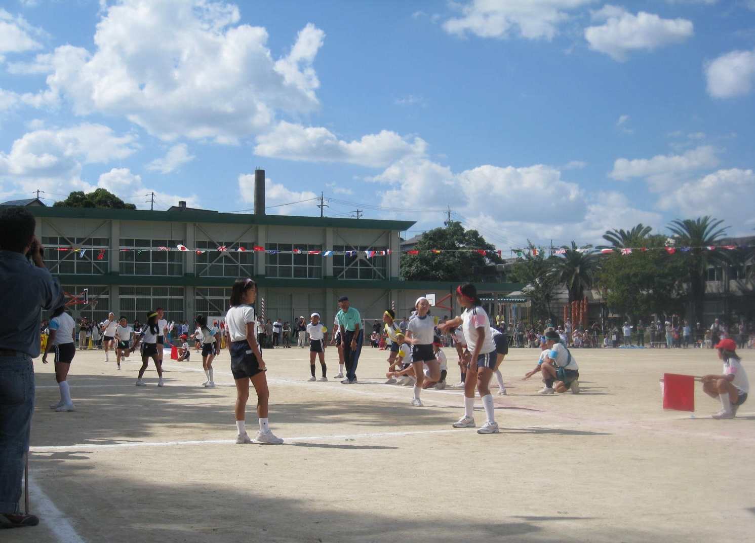 愛知教育大学附属岡崎小学校（岡崎市六供町）